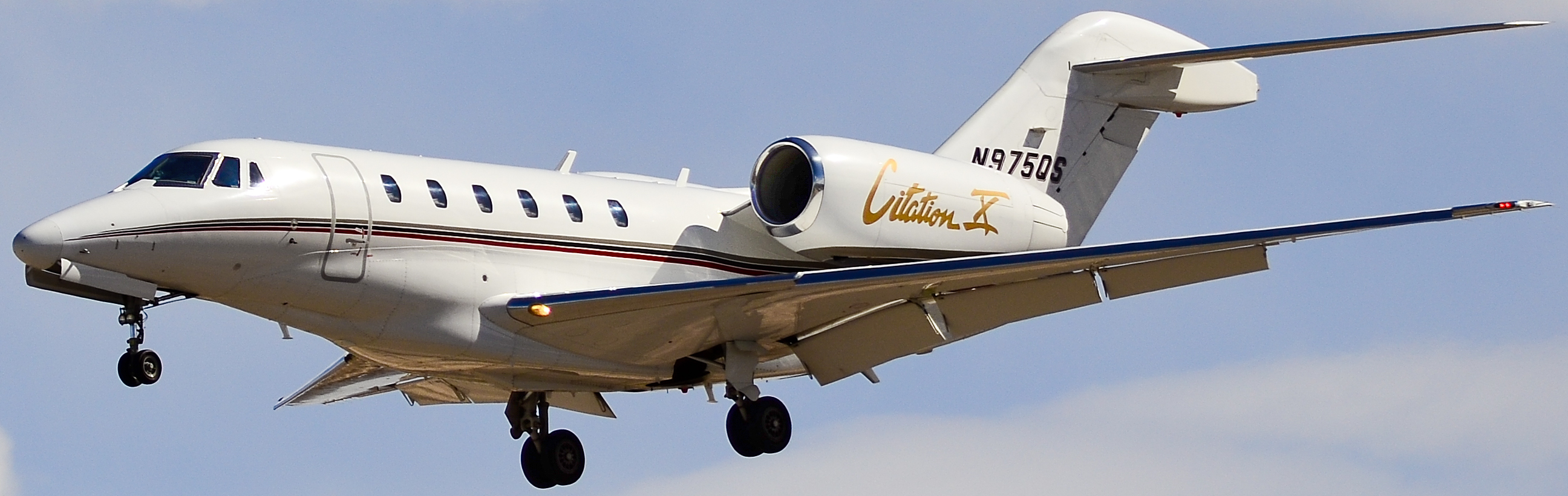 Las Vegas - McCarran International (LAS / KLAS) USA - Nevada, April 01, 2012 Photo: Tomás Del Coro